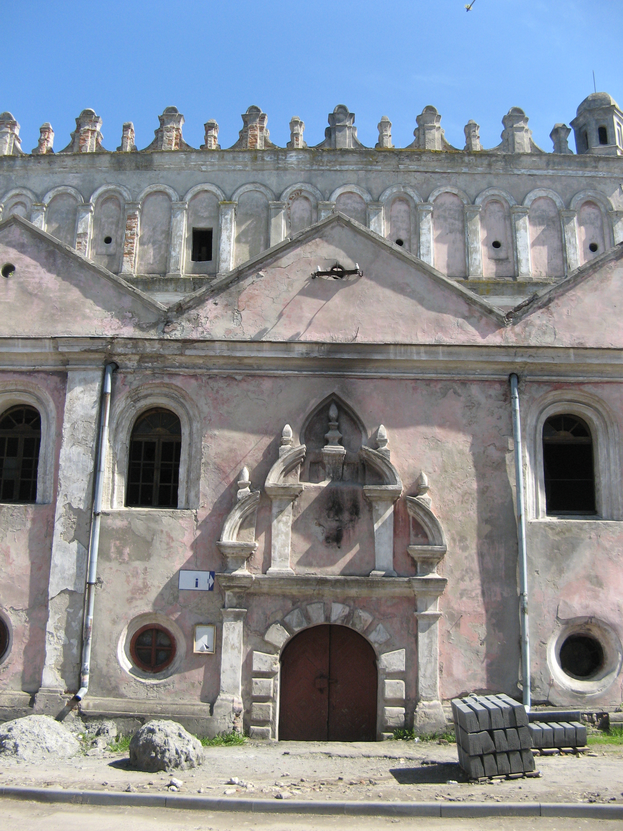 Synagoga w Żółkwi